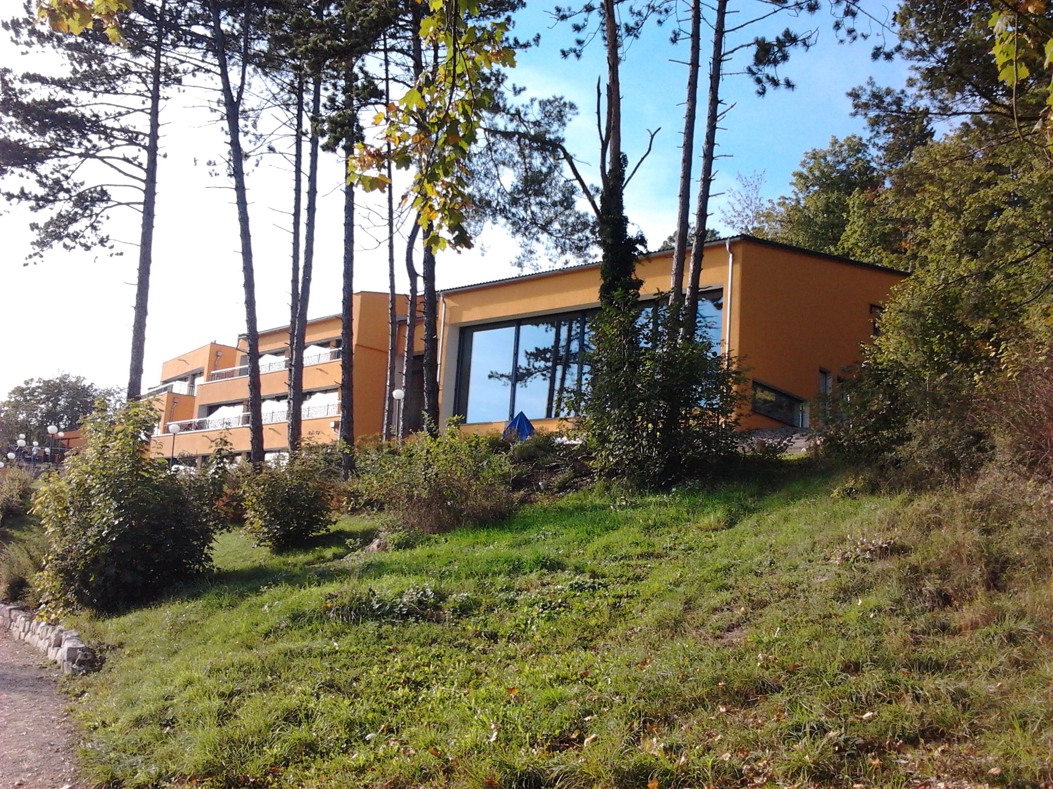 Hotel Schönblick Eichstätt, Neubau.